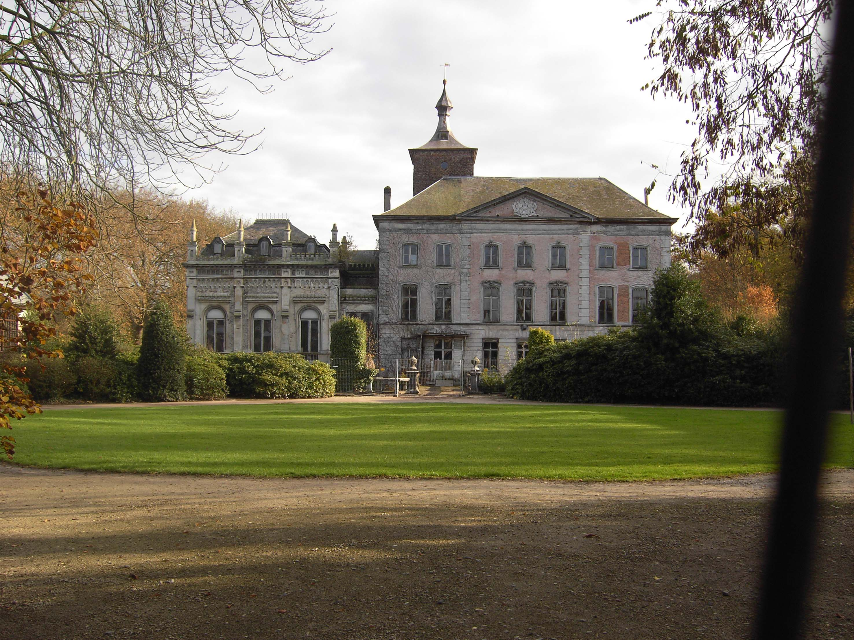 Vurste (Gavere) - Castle Borgwal